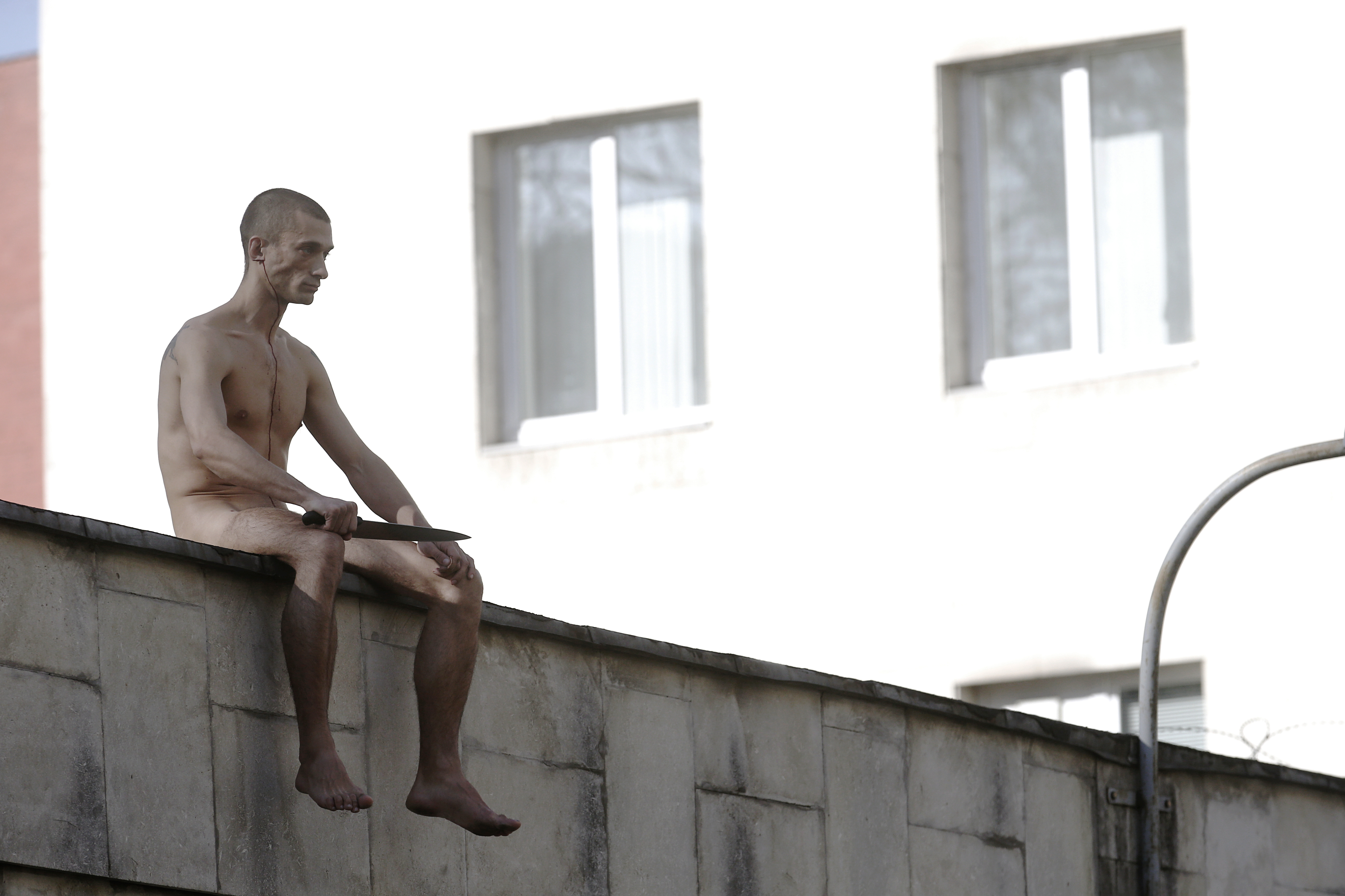 Петр Павленский. Отделение